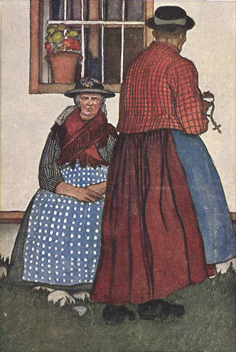 Auszüglerinnen aus dem Lesachtale in Trachtenkleidern